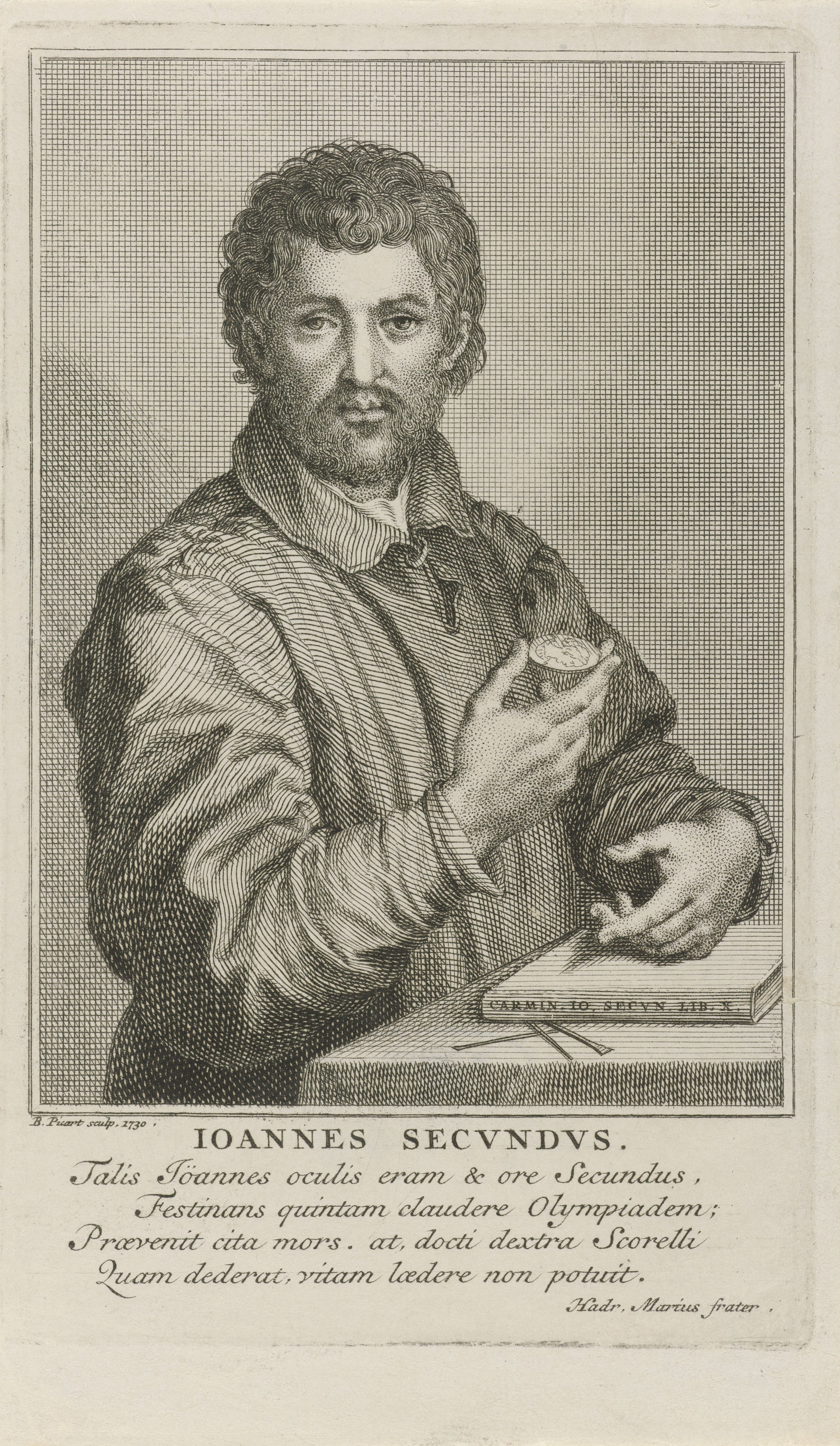 IdentificatieTitel(s): Portret van Janus SecundusObjecttype: prent Objectnummer: RP-P-1906-1544Opschriften / Merken: verzamelaarsmerk, verso, gestempeld: Lugt 2228Omschrijving: Portret van de schrijver Janus Secundus. In zijn hand houdt hij een medaillon met het portret van Julia, zijn eerste grote liefde, over Wie: hij een liefdeselegie schreef. In de marge een vierregelig onderschrift in het Latijn.VervaardigingVervaardiger: prentmaker: Bernard Picart (vermeld op object)schrijver: Hadrianus Marius (vermeld op object)Plaats vervaardiging: AmsterdamDatering: 1730Fysieke kenmerken: ets en gravure op grijs geprepareerd wit papierMateriaal: geprepareerd papier Techniek: etsen / graveren (drukprocedé)Afmetingen: plaatrand: h 125 mm × b 77 mmOnderwerpWat: portrait of a writermedal (considered as a piece of sculpture, regardless of its specific function)WieJanus SecundusVerwerving en rechtenVerwerving: aankoop 1906Copyright: Publiek domein